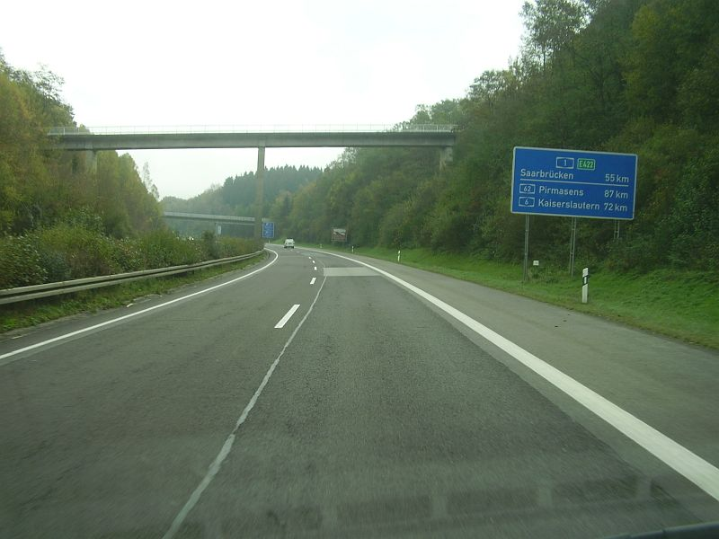 Route européenne 422 entre Trèves et Sarrebruck